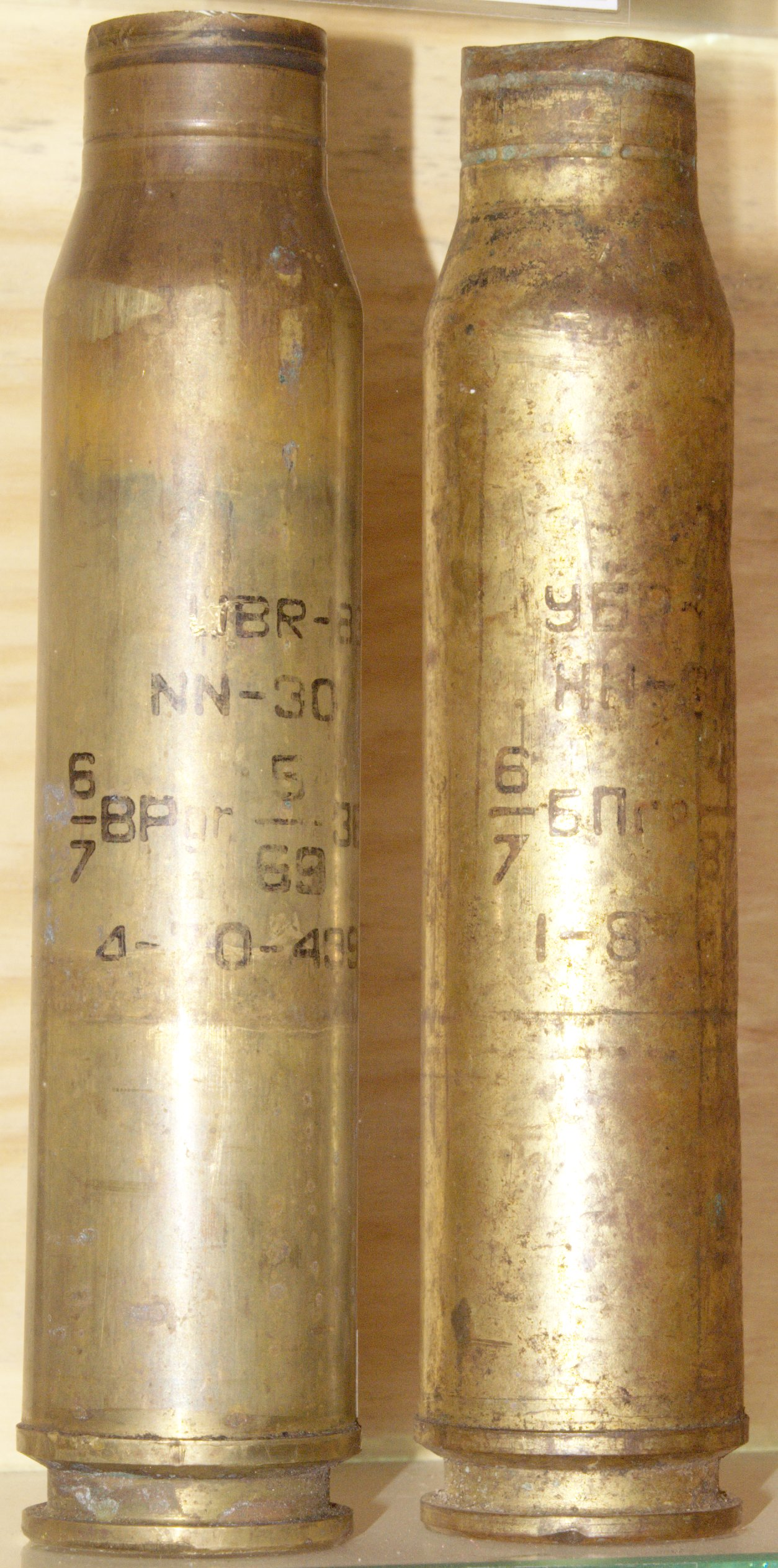 Łuski nabojów 30x210B do armty NN-30 (AK-230)